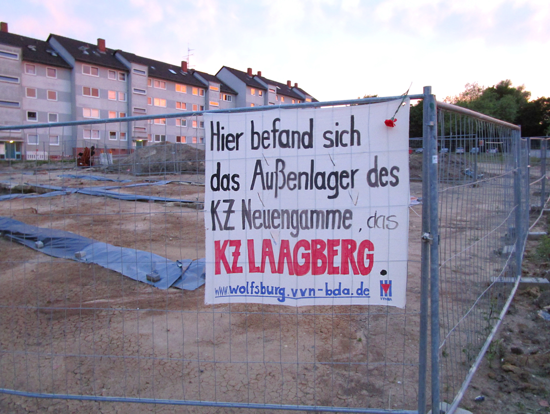 KZ-Außenlager Laagberg, mit schwarzen Planen abgedeckte Fundamente der KZ-Baracke Block 4, Bauzaun mit Plakat der VVN/BdA